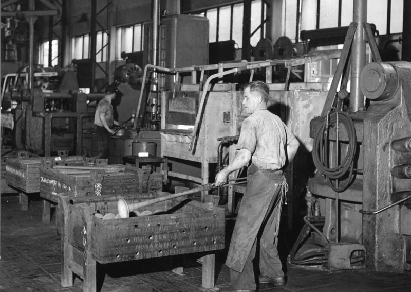 Daimler-Benz A.G. Werk Stuttgart-Untertürkheim in der Schmiede